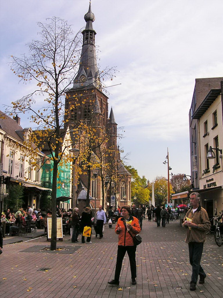 Rua Oude Markt no centro de Tilburgo